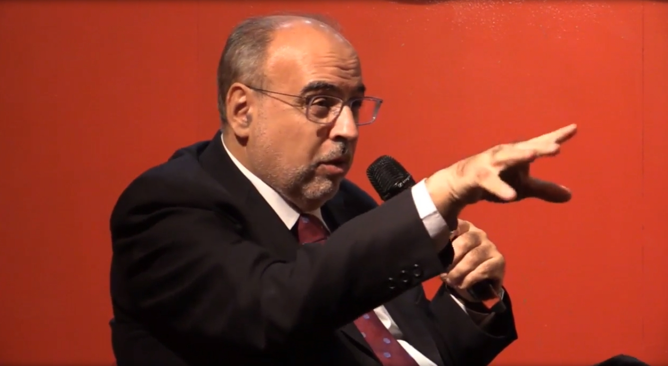 Pablo Iglesias y Enric Juliana presentan el libro 'Nudo España'.